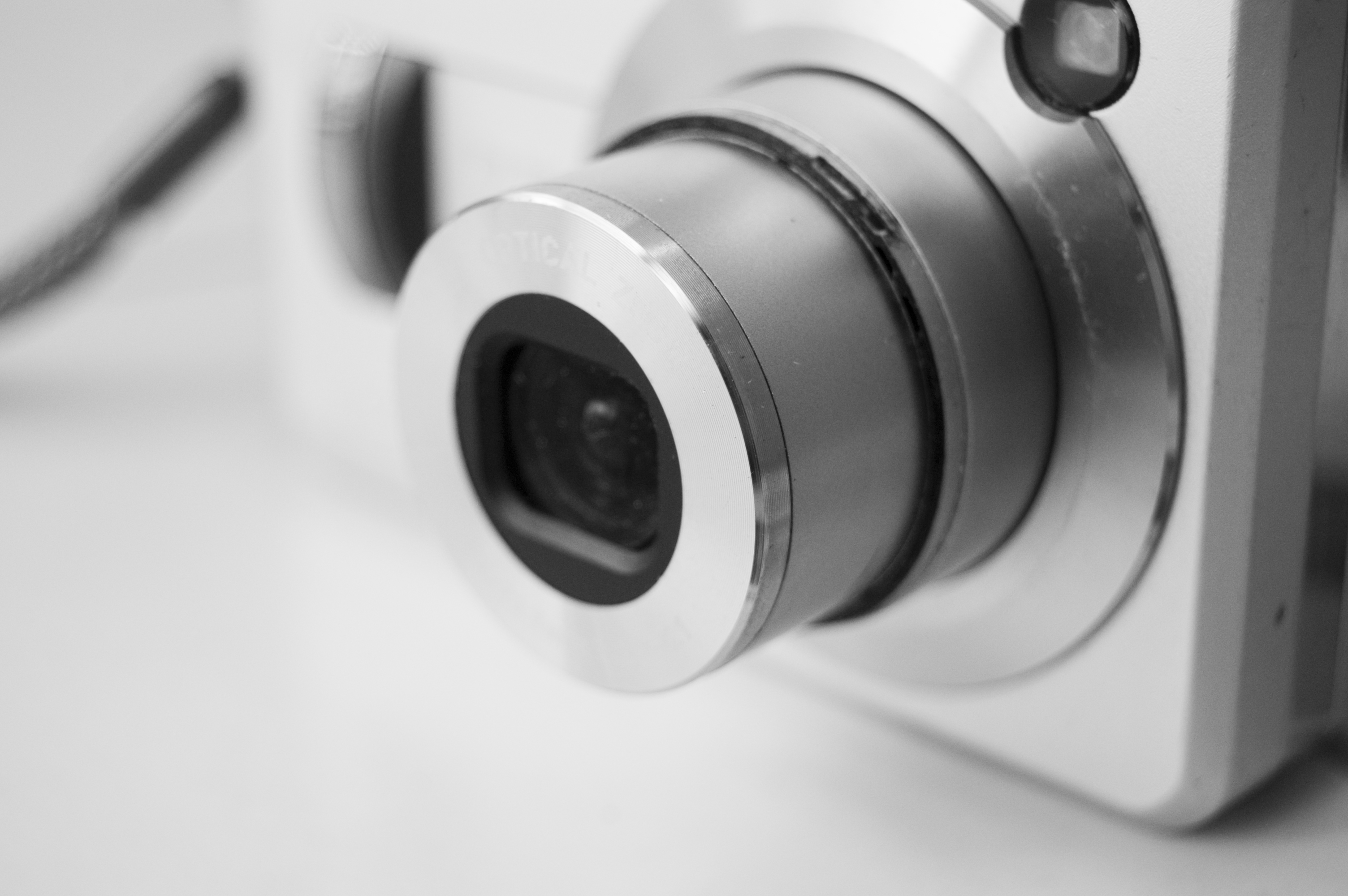 'n Casio-mik-en-druk-kamera.